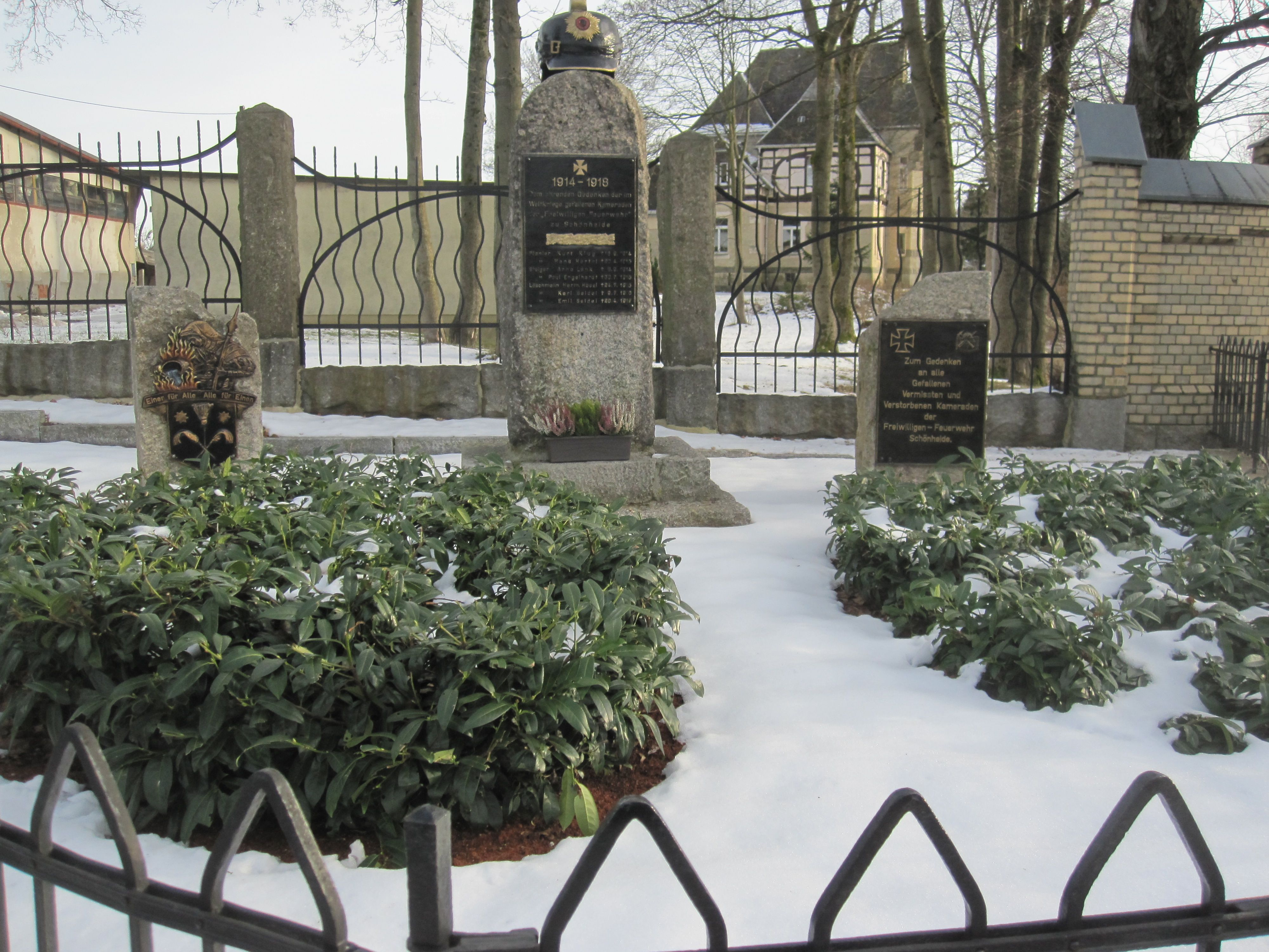 Das nach dem Ersten Weltkrieg errichtete Feuerwehrdenkmal an der Ecke Hauptstraße/Schneeberger Straße erinnert an die in diesem Krieg gefallenen Mitglieder der Feuerwehr. Das Denkmal wurde mehrfach umgestaltet. In den 2000er Jahren war die Tafel mit den Namen der Opfer des Ersten Weltkrieges entfernt worden. Auf dem Granitstein in der Mitte war die jetzt auf dem Foto rechts zu sehende Tafel mit einem allgemein gehaltenen Gedenktext angebracht worden. Er lautet: „Zum Gedenken an alle Gefallenen, Vermissten und Verstorbenen Kameraden der Freiwilligen-Feuerwehr Schönheide.“ (sic!) Im Jahr 20013 wurde im Zuge einer Umgestaltung der mittlere Stein durch zwei neue ergänzt, auf dem linken ist eine Eisengusstafel mit Feuerwehrsymbolen und auf dem rechten die vorstehend zitierte allgemeine Gedenktafel angebracht. Der Text der ursprünglich einzigen Tafel ist wieder auf dem mittleren Stein zu lesen: „Zum ehrenden Gedenken der im Weltkriege gefallenen Kameraden der ‚Freiwilligen Feuerwehr‘ zu Schönheide. Pionier Kurt Klug + 16. 9. 1914, Pionier Hans Hertel + 20. 4. 1915, Steiger Arno Lenk + 8. 9. 1914, Steiger Paul Engelhardt 30. 7. 1915, Löschmann Herm. Hösel 24. 7. 1915, Löschmann Karl Seidel 9. 7. 1915, Löschmann Emil Seidel 20. 4. 1917“ Ob diese Tafel ein Neuguss ist oder die originale Tafel aus der Entstehungszeit des Denkmals, ist bei einer Ortsbesichtigung nicht zu erkennen.